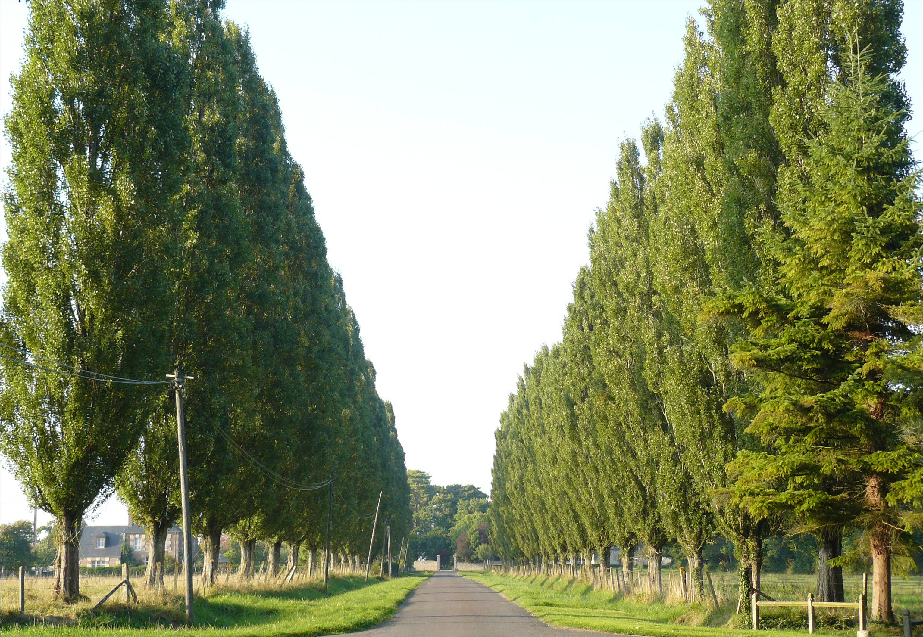 Rue principale allant de la cour du bois au bourg